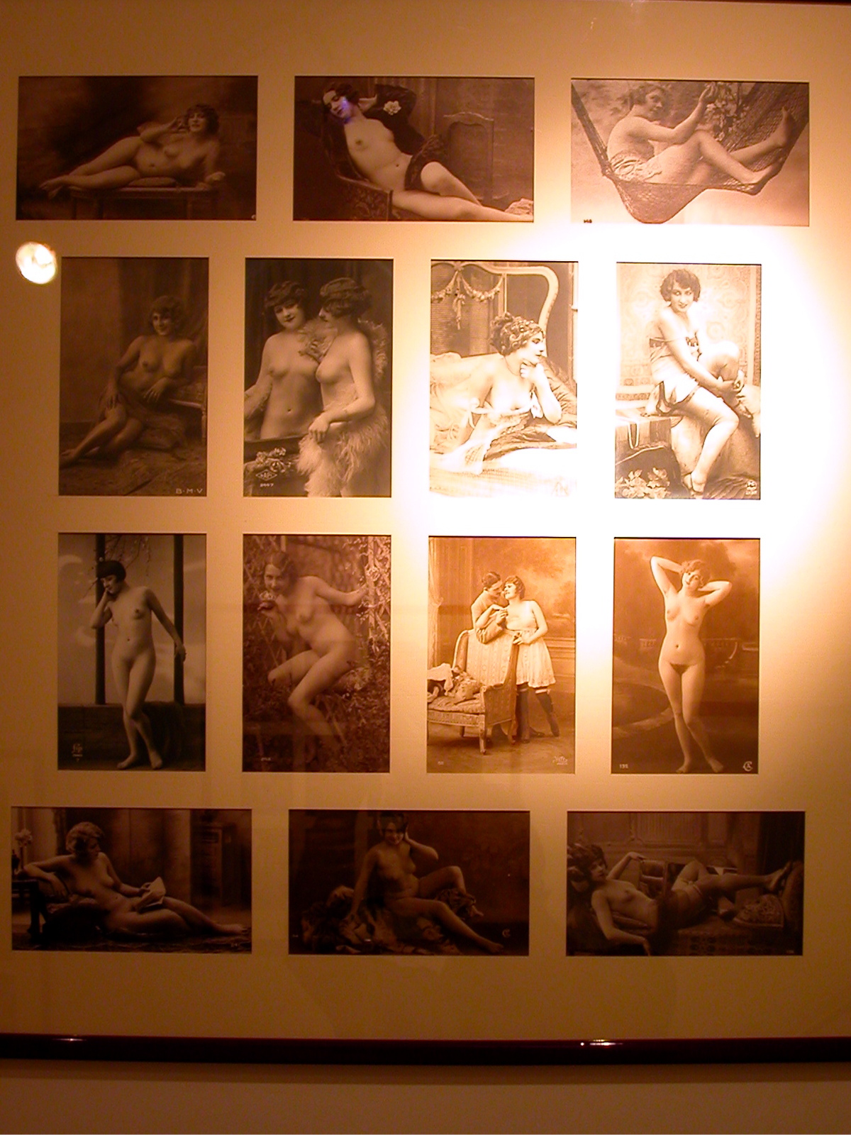 Musée de l'érotisme à Paris - anciennes Photos